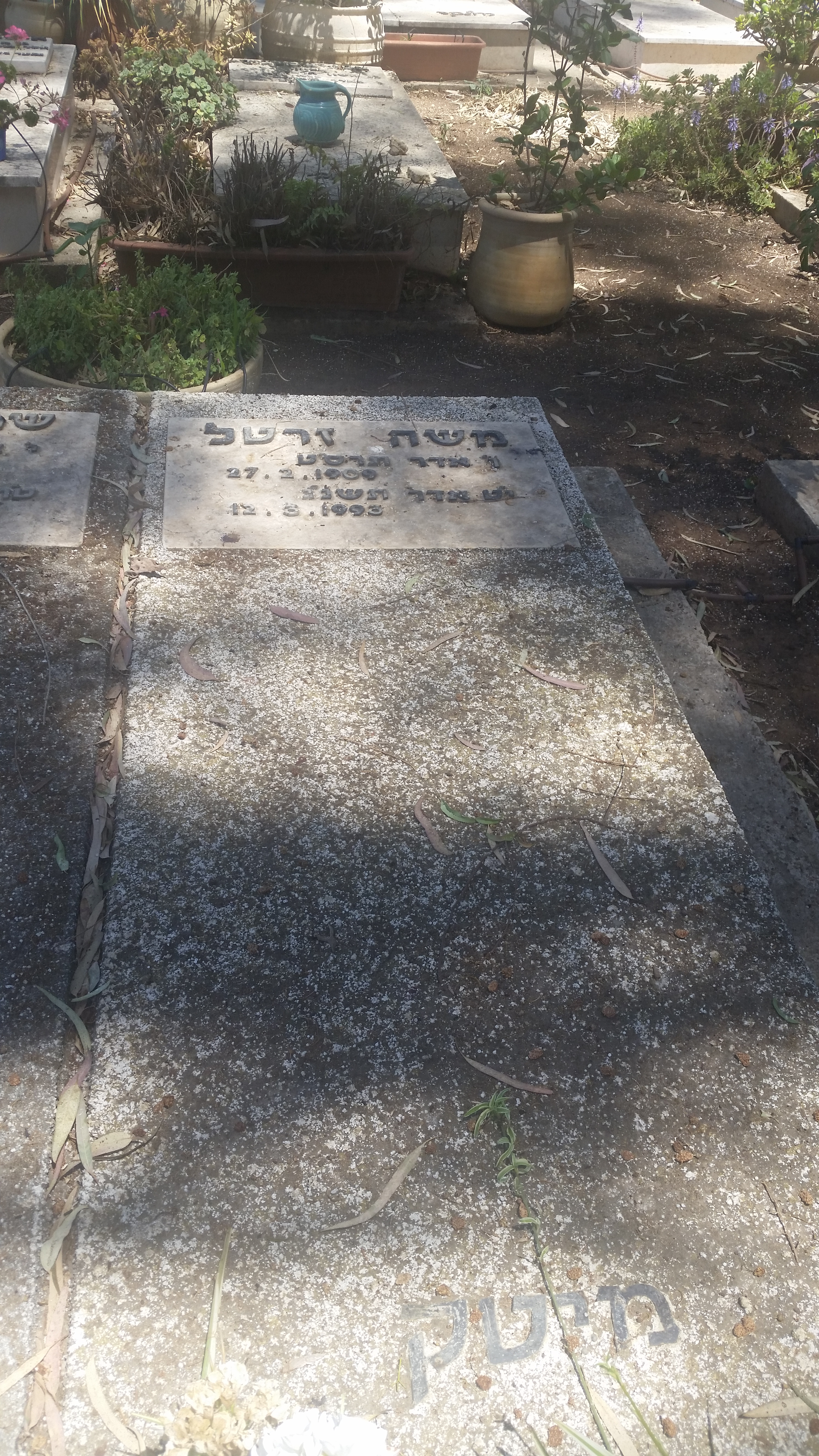 קברו של משה זרטל בבית הקברות בקיבוץ עין שמר